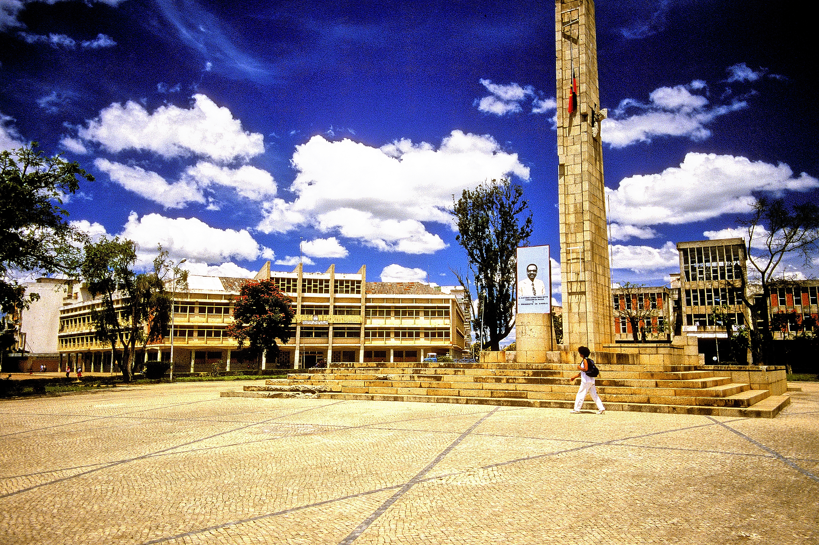 Cenral Square, Huambo.Angola